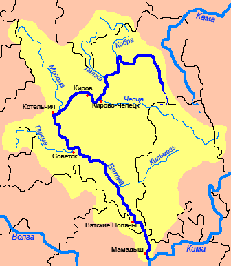 Схема реки Вятка